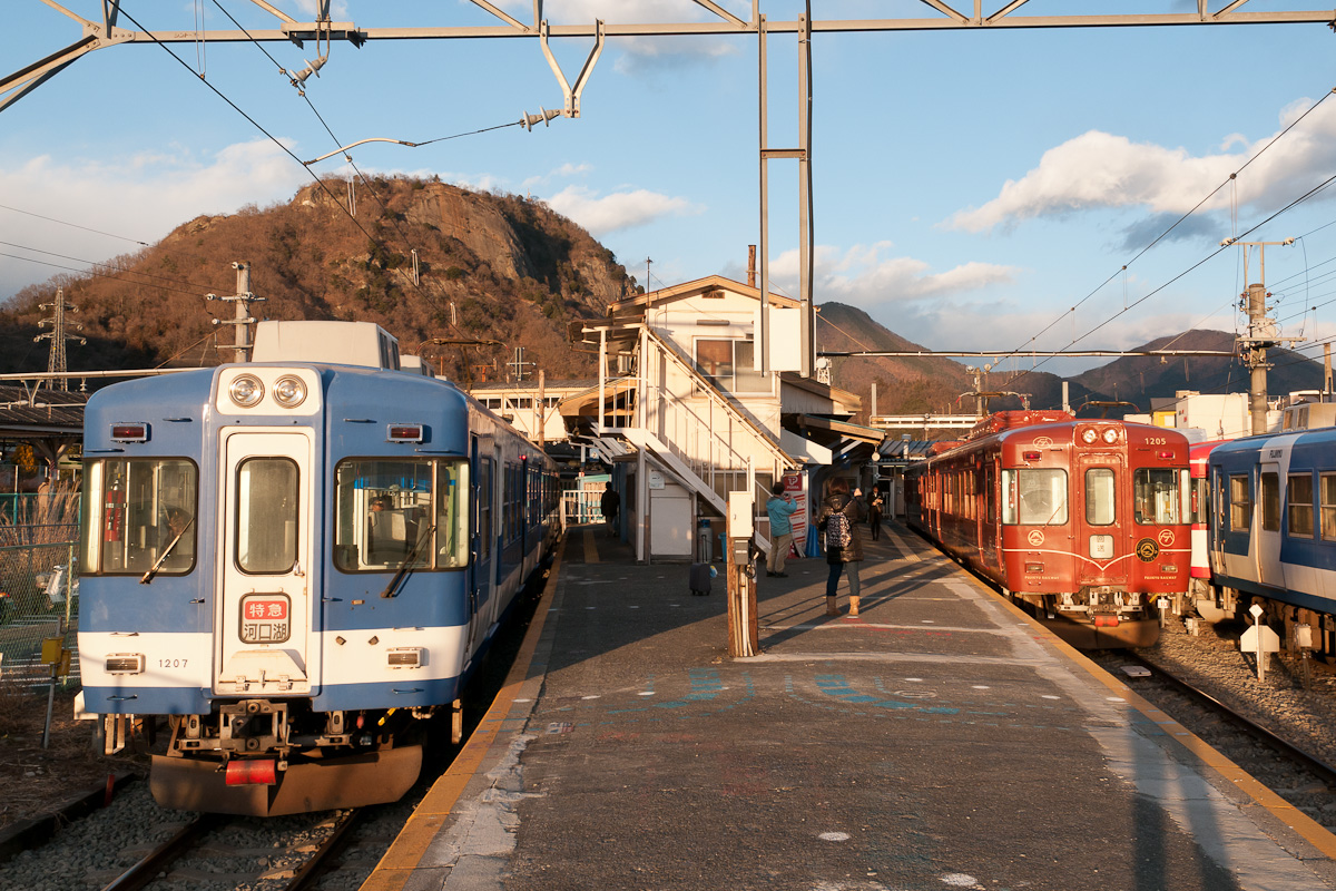 富士急行大月駅。